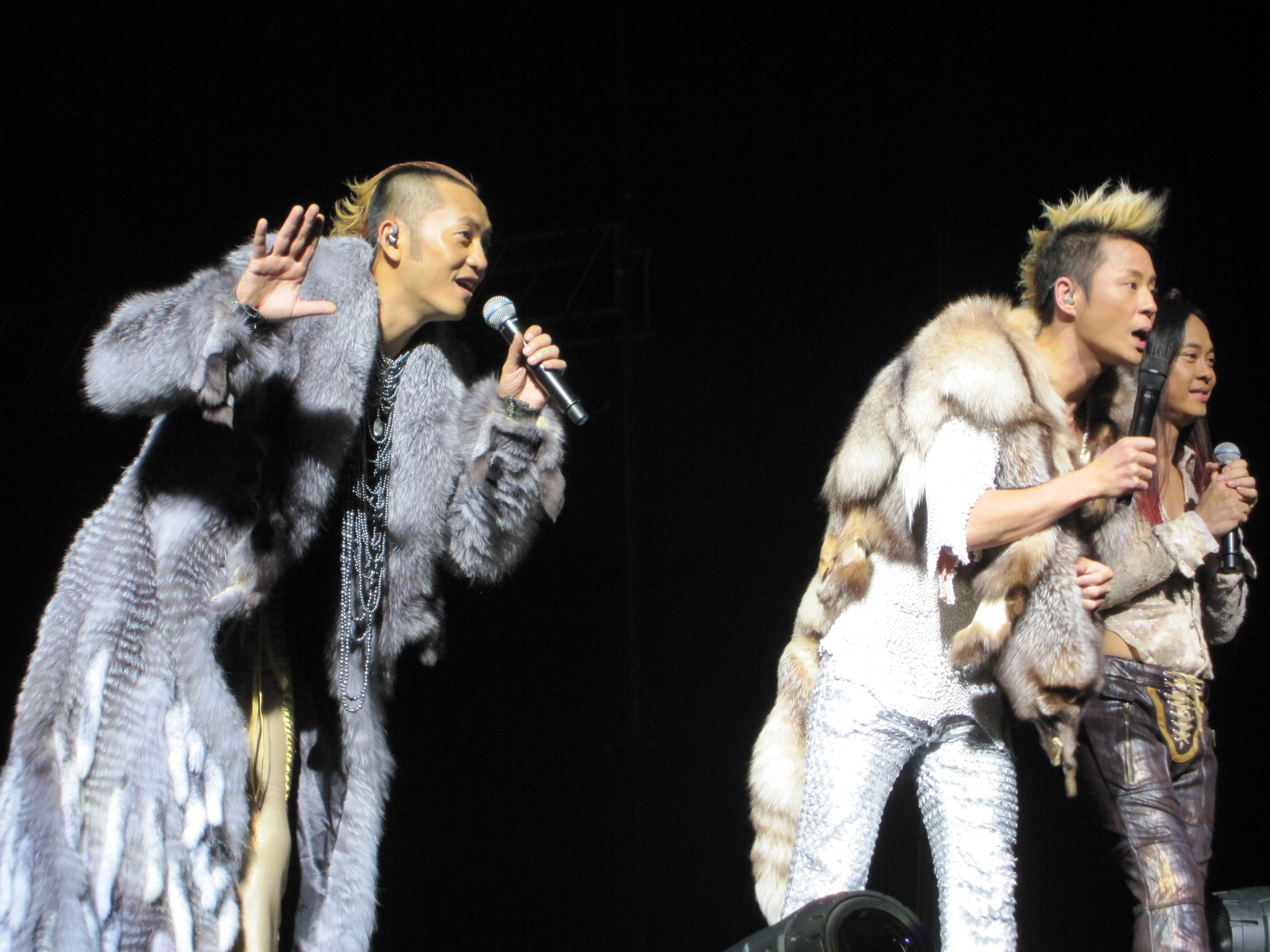 草蜢25周年，悉尼2009演唱会。